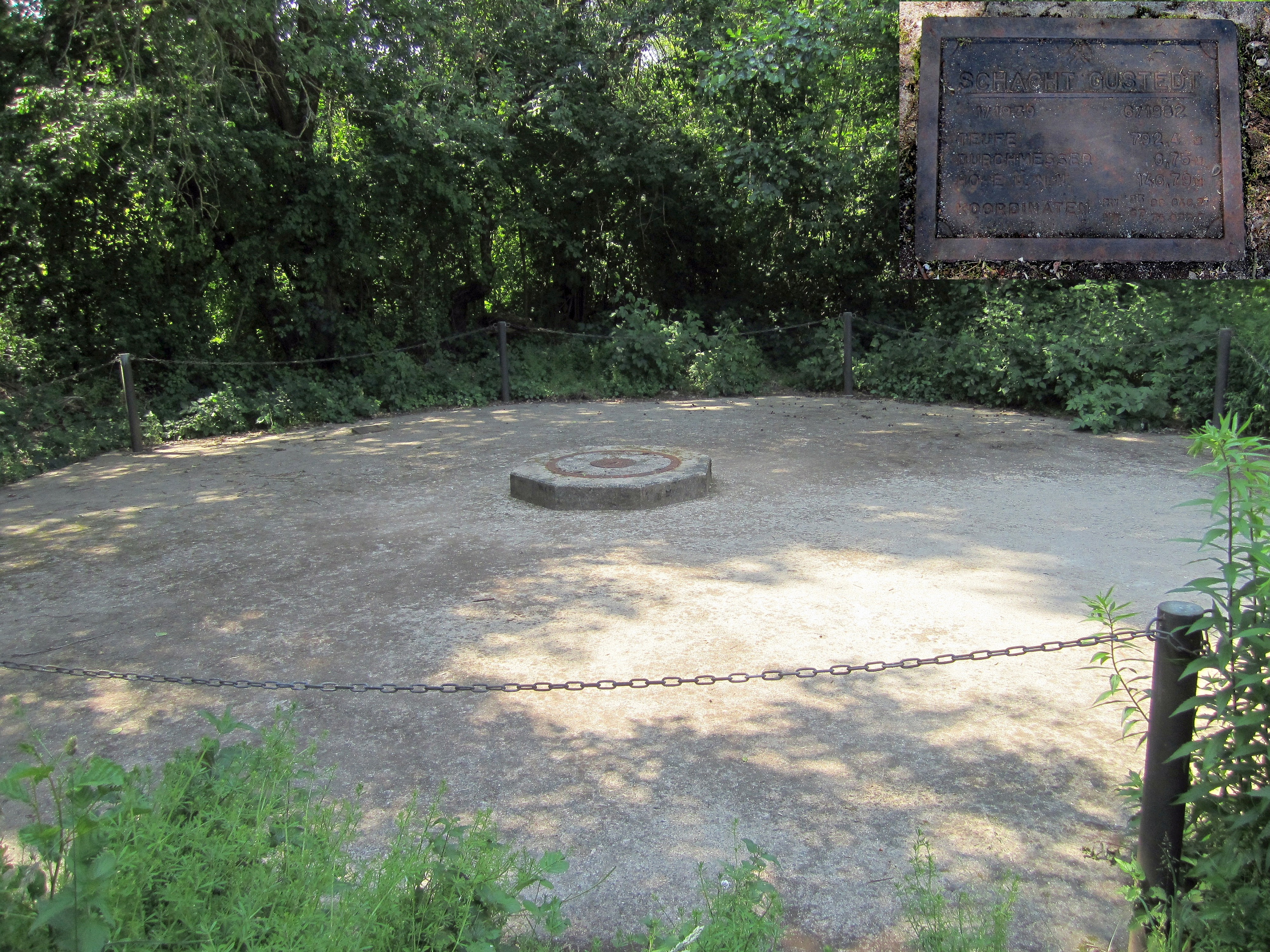 Schachtdeckel des Schachtes Gustedt mit Schachttafel. Gustedt, Niedersachsen, Deutschland.